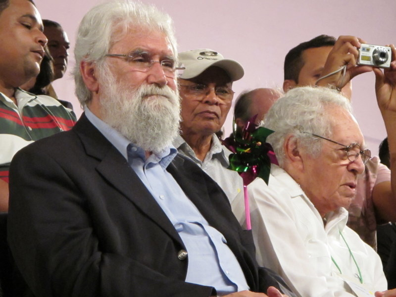 Leonardo Boff e Thiago de Mello em destaque. Ao fundo, Sr. Pedro, pai de Marina Crédito: Divulgação/Juliano Spyer